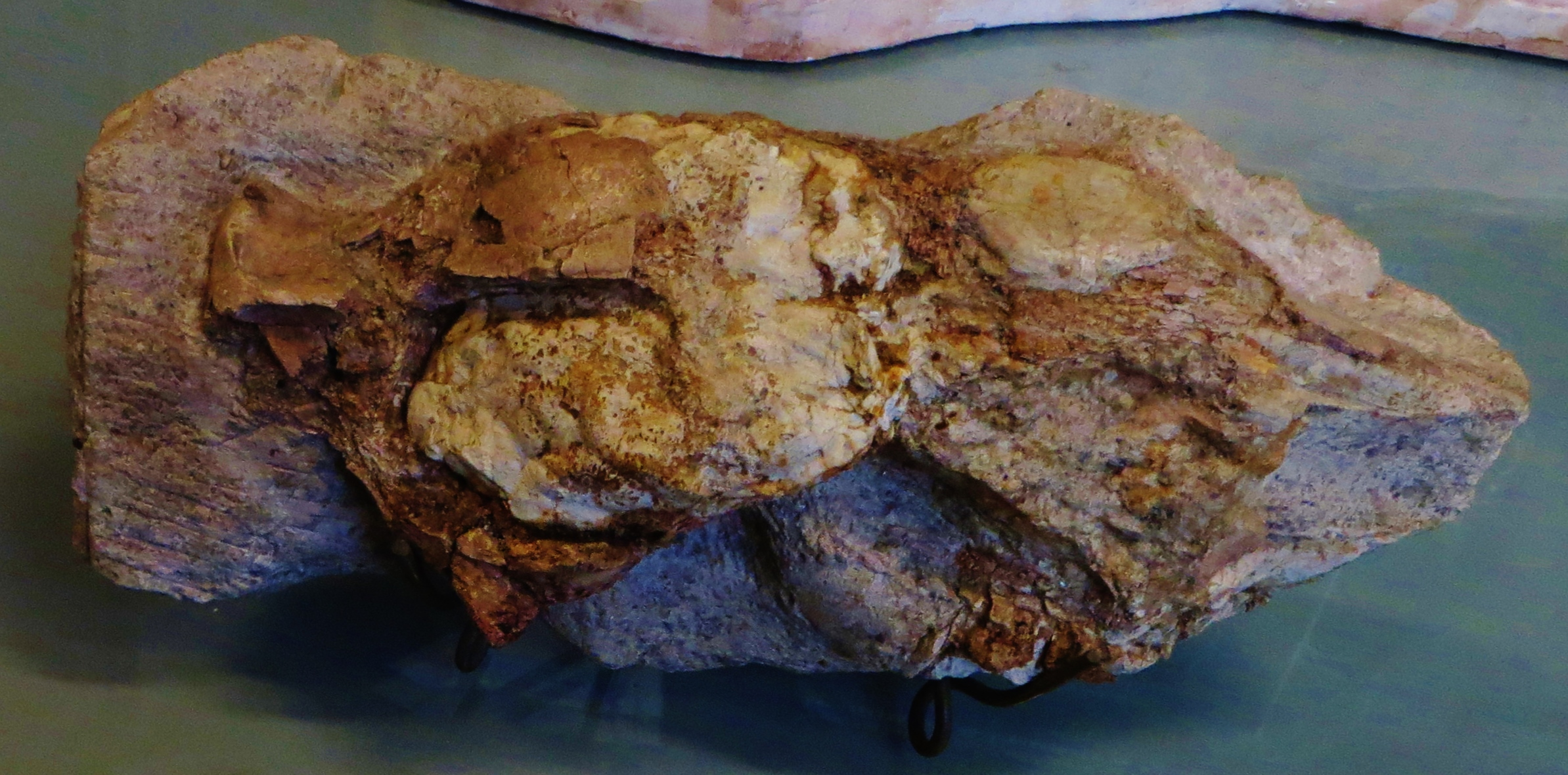 Fossil of Palaeotherium, an extinct mammal- Took the photo at Musee d'Histoire Naturelle, Paris